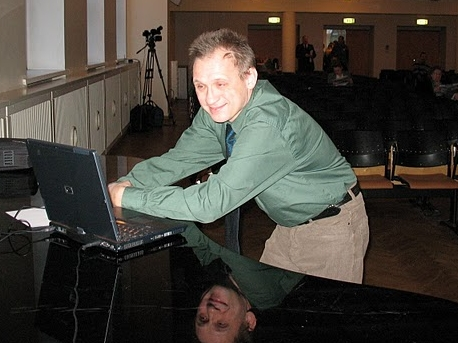 Ott Köstner Erakonna Eestimaa Rohelised Tallinna piirkonna asutamiskoosolekul Tallinna Ülikooli peahoones